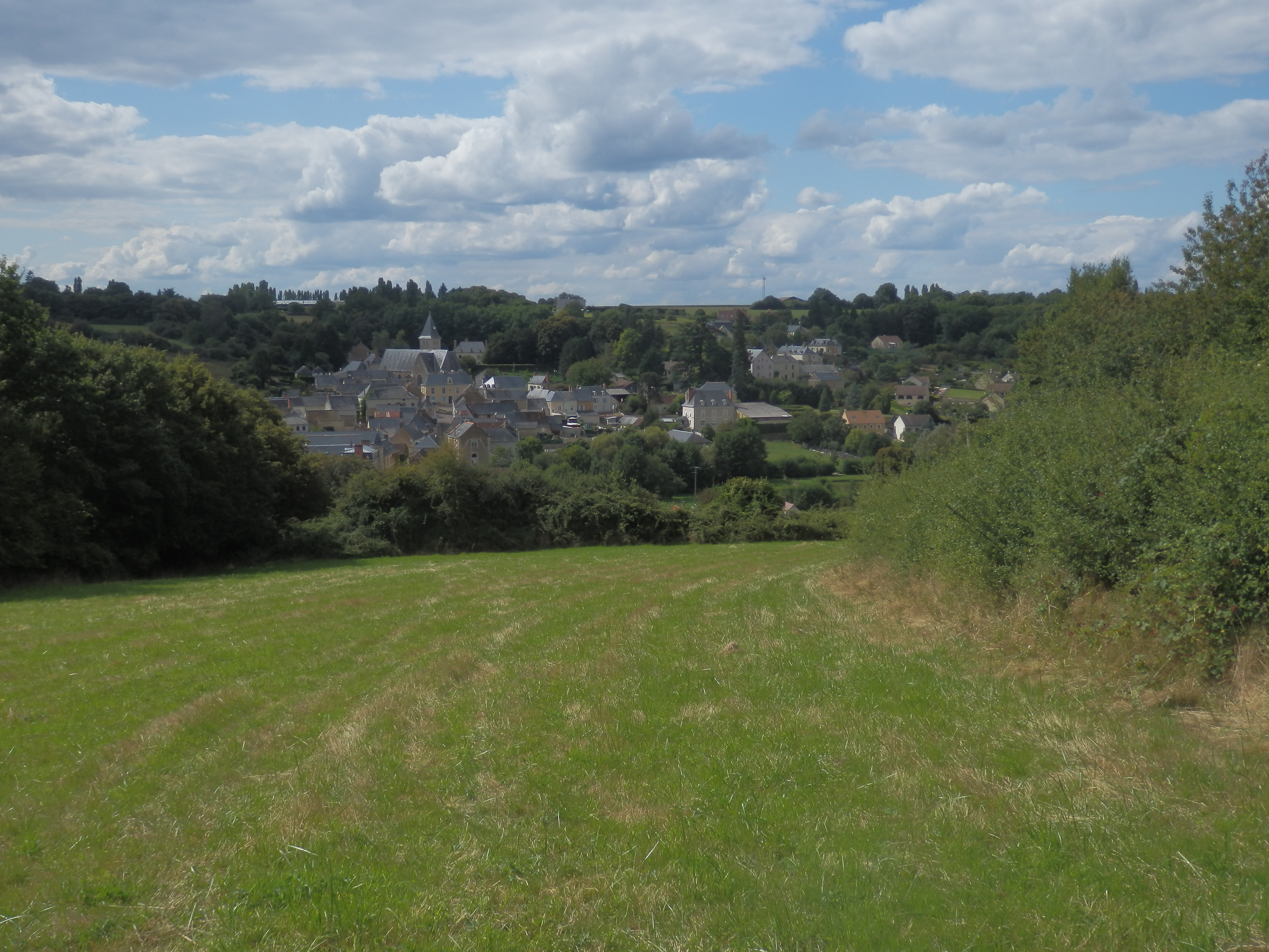 Courdemanche vu depuis la route de Saint-Fraimbault